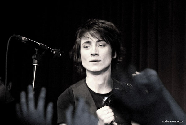 Russian singer Zemfira (Земфира, новогодняя вечеринка в клубе «16 тонн»)